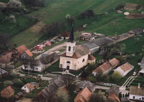 Bakonynána, Hungary, aerial photography. Szent Anna római katolikus templom